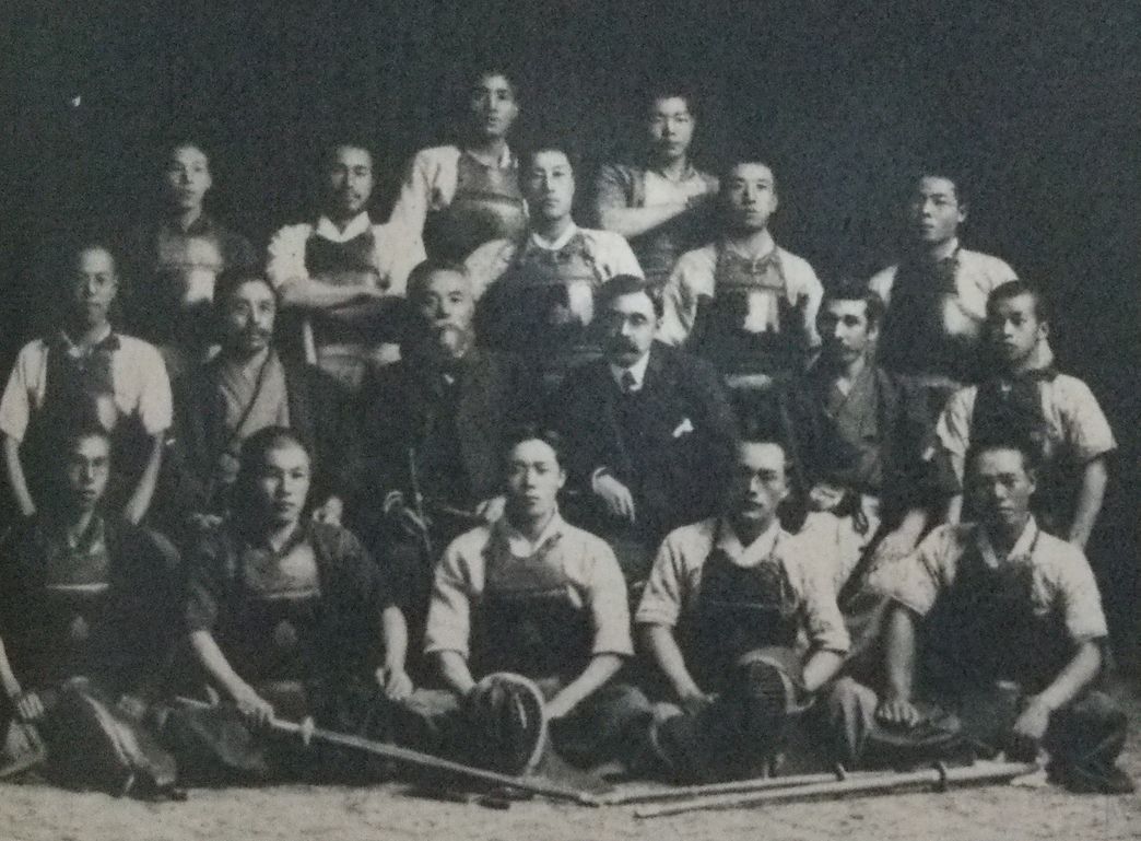 一高剣道部時代の末弘厳太郎（2列目右端）